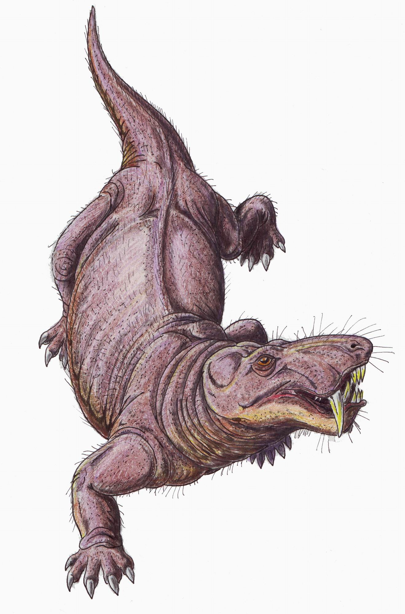 Rubigea atrox